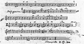 Уласнаручны запіс беларускіх песняў, зроблены М. Карловічам у 1900 г.